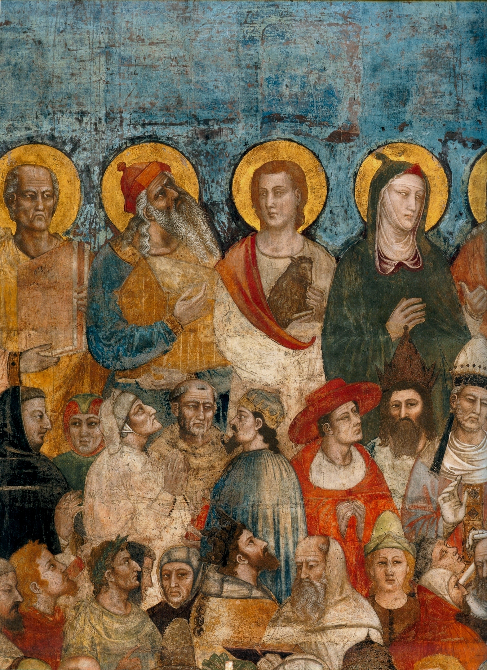 detail